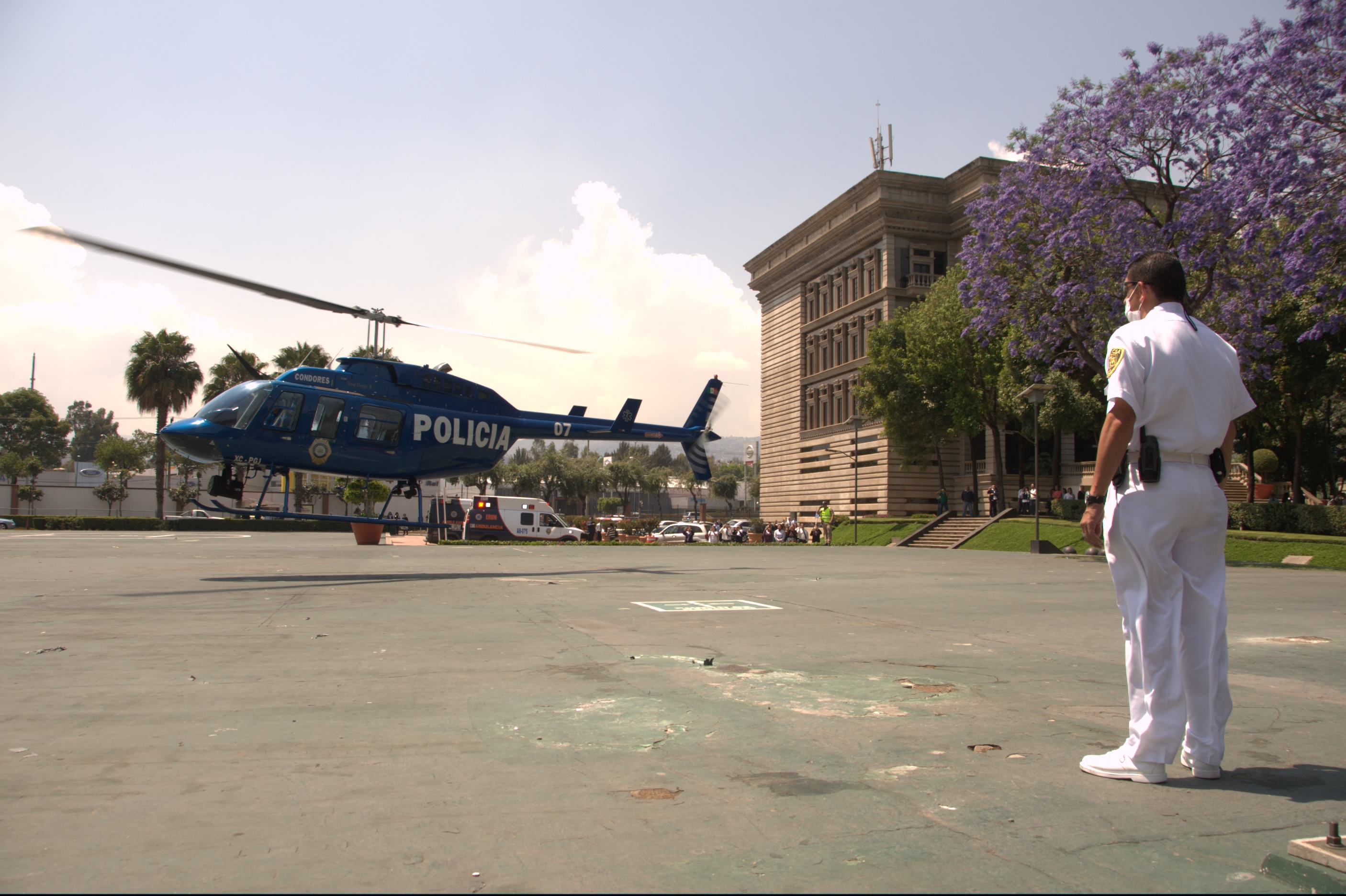 1 Helicóptero de la policía de la Ciudad de México para simulacro de evacuación médica en ITESM Campus Ciudad de México